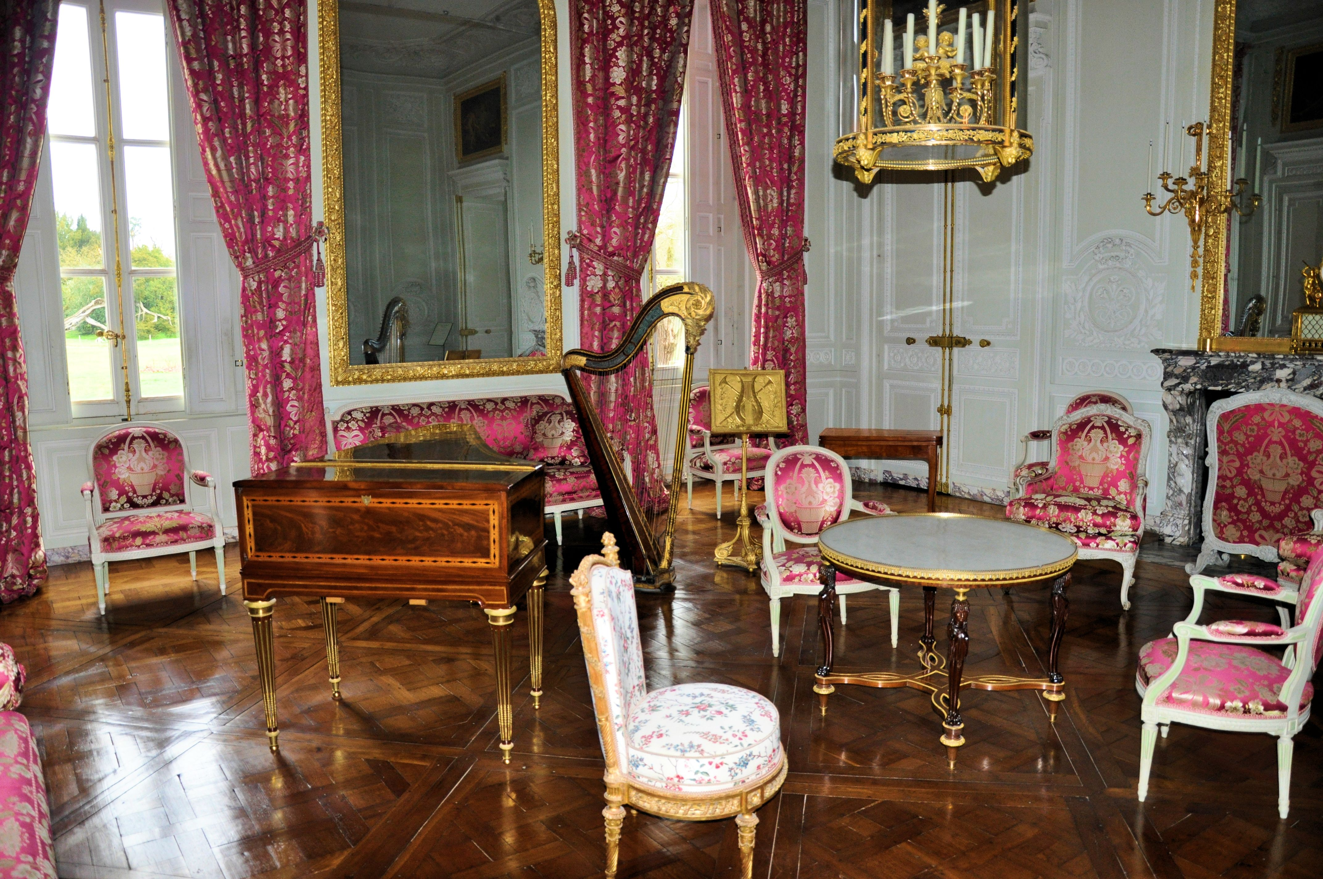 Petit Trianon - Salon de compagnie